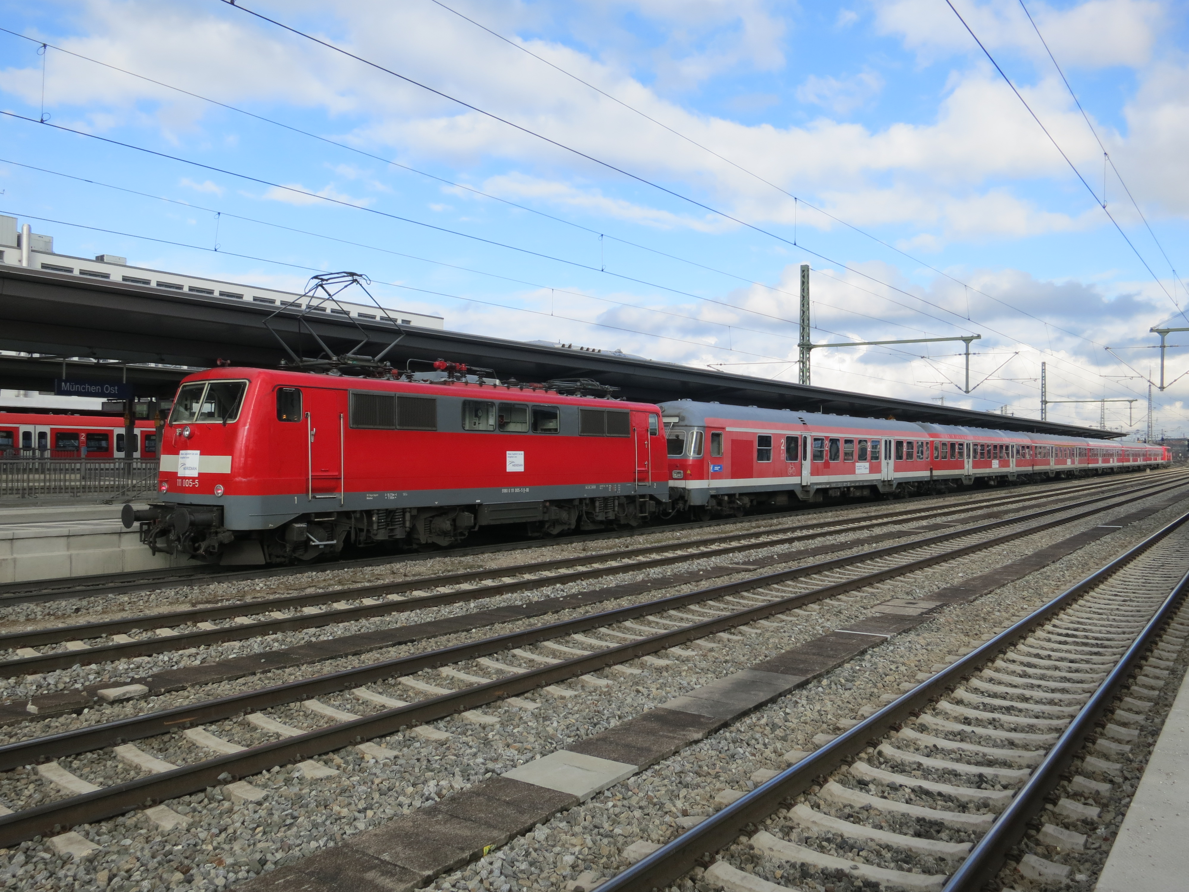 Elektrolok der Baureihe 111 und n-Wagen mit abgeklebten DB-Logos als Ersatzzug für noch nicht zugelassene Meridian-Triebwagen im Bahnhof München Ost